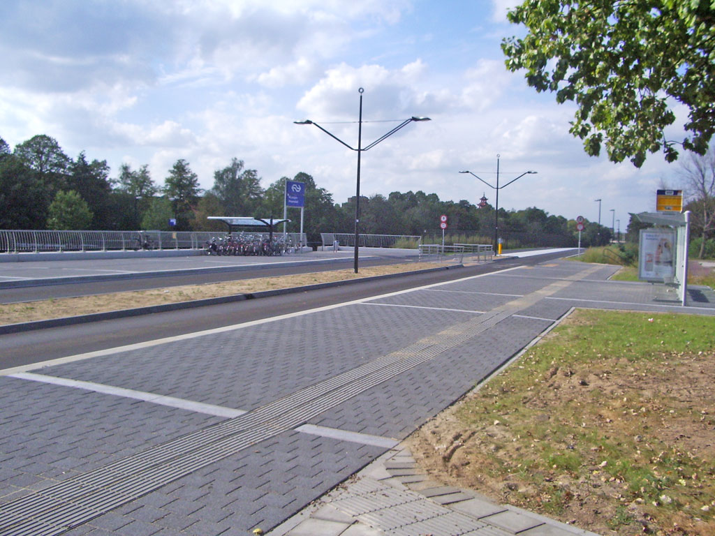 De nieuwe busbaan bij station Heyendaal, gezien richting het centrum. September 2006 Nijmegen Heyendaal